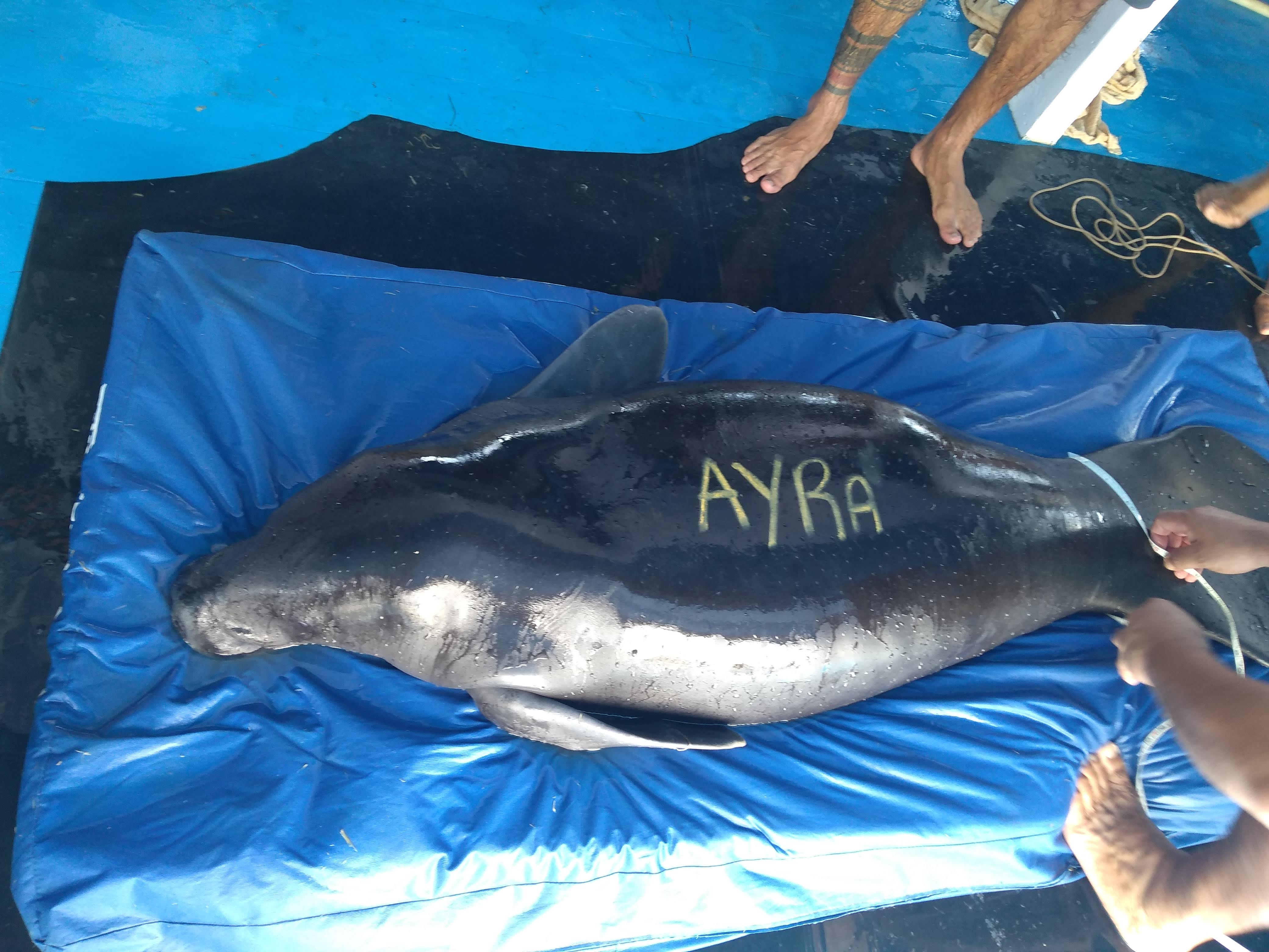 Programa de reintrodução de peixe-boi amazônico realizado pelo INPA (Instituto Nacional de Pesquisas da Amazônia) e colaboradores.